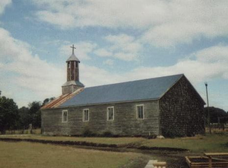 Iglesia del poblaSan Agustín, Isla Lemuy, Provincia de Chiloé, Chiledo de San Agustín